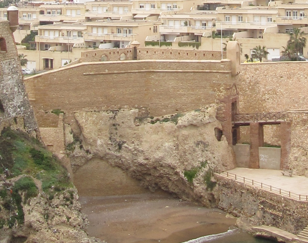 Baluarte de las Cinco Palabras o torre de Alafia, en Melilla, visto desde el baluarte de la Concepción. A la derecha, el puente de las Cinco Palabras.